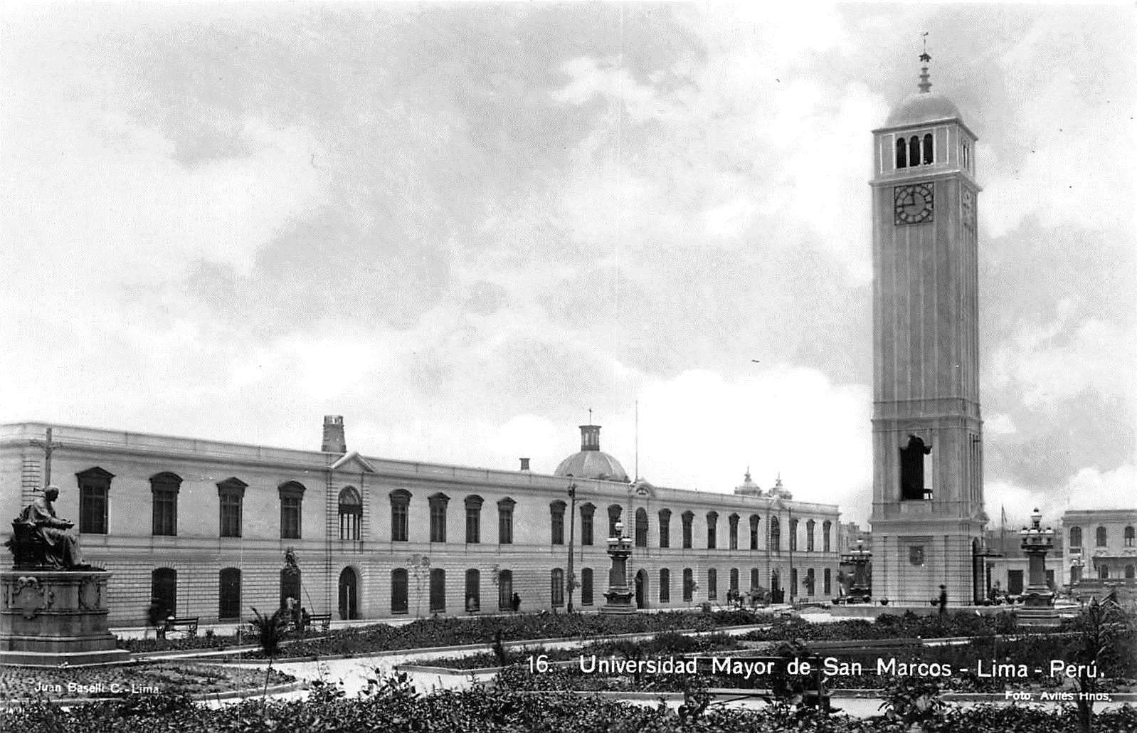 ESPACIO UNIVERSITARIO El "Parque de la Universidad" o "Parque Universitario" representó el nuevo espacio que la educación superior requería en el marco del proyecto moderno de finales del s. XIX y parte del s. XX. El cual, paulatinamente, se fue adornando y modificando como sucedió en 1921 cuando al frente de la sede de la Universidad de San Marcos (sobre la cual se puede apreciar el antiguo observatorio) se construyó la "Torre del Reloj" o "Torre Alemana" (regalo de la comunidad alemana por el Centenario de la Independencia del Perú). Pocos años después se agregaron monumentos conmemorando a egregios maestros sanmarquinos como Bartolomé Herrera (1922), Sebastian Lorente (1924) e Hipólito Unanue (1931), además de espacios abiertos para el solaz de estudiantes y transeúntes. (Foto: Avilés Hnos. Postal de 1924 - 25).